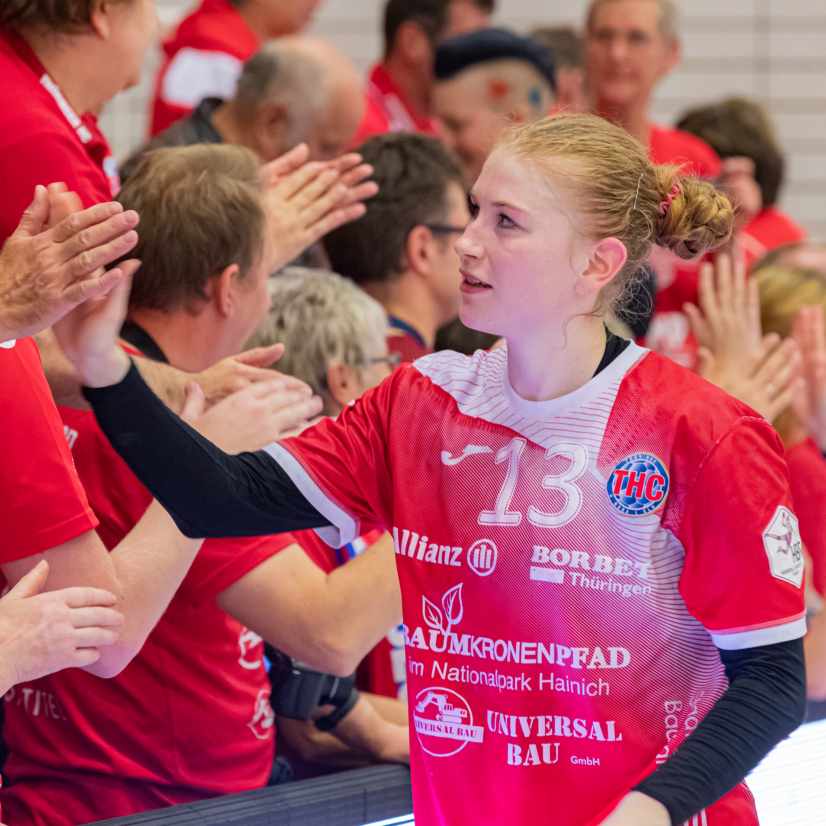 Handball, 1. Bundesliga Frauen, Thüringer HC - Buxtehuder SV; Meike Schmelzer (Thüringer HC, 13) beim Abklatschen der Fans nach dem Spiel